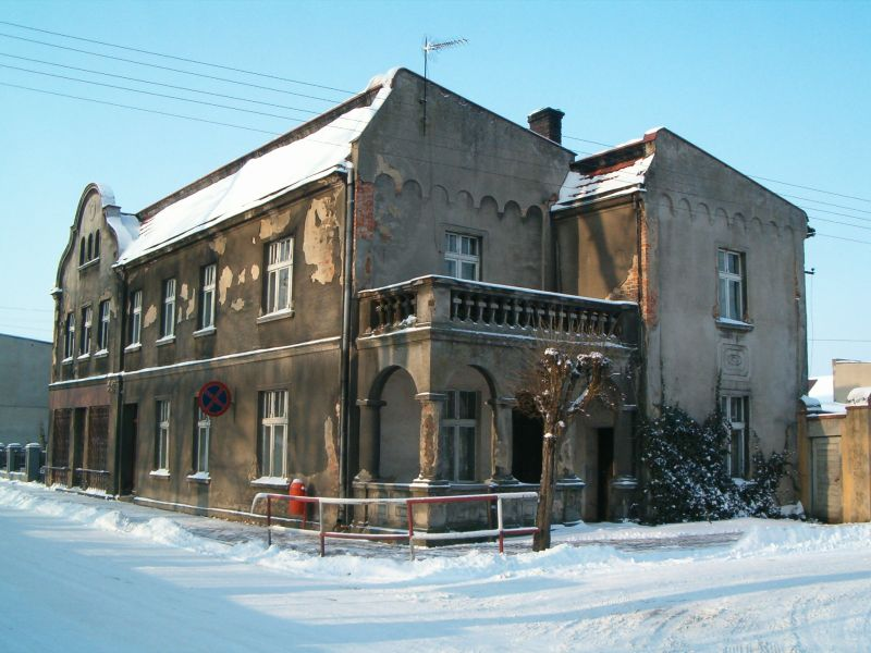 Dobrzyca, ul. Pleszewska 1 - dom z 1844 (zabytek nr 1209).